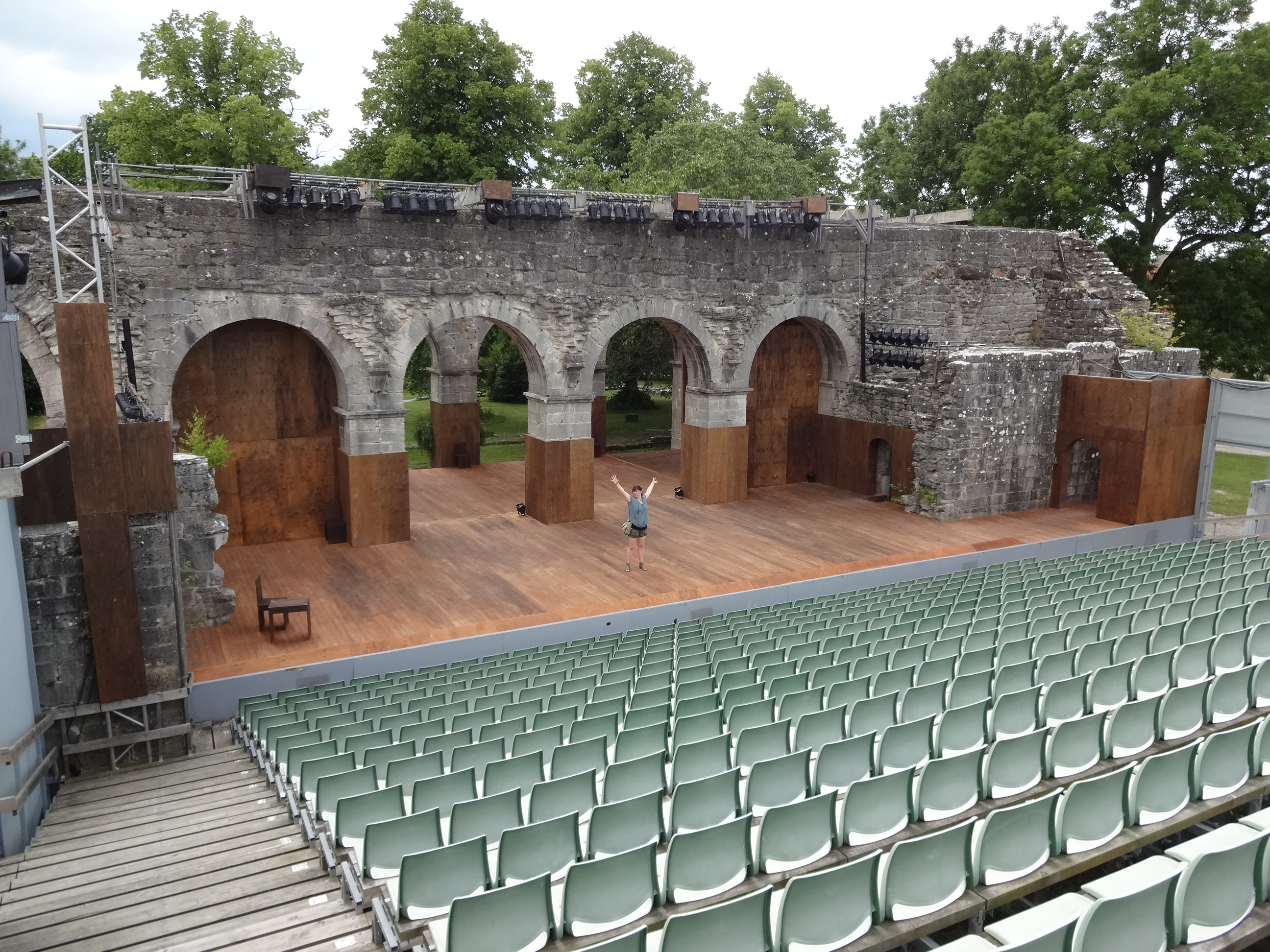 Roma Teater — Gotland.